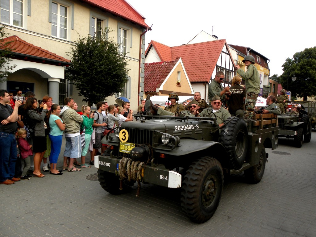 Impreza D-Day w Helu, 2011 rok.